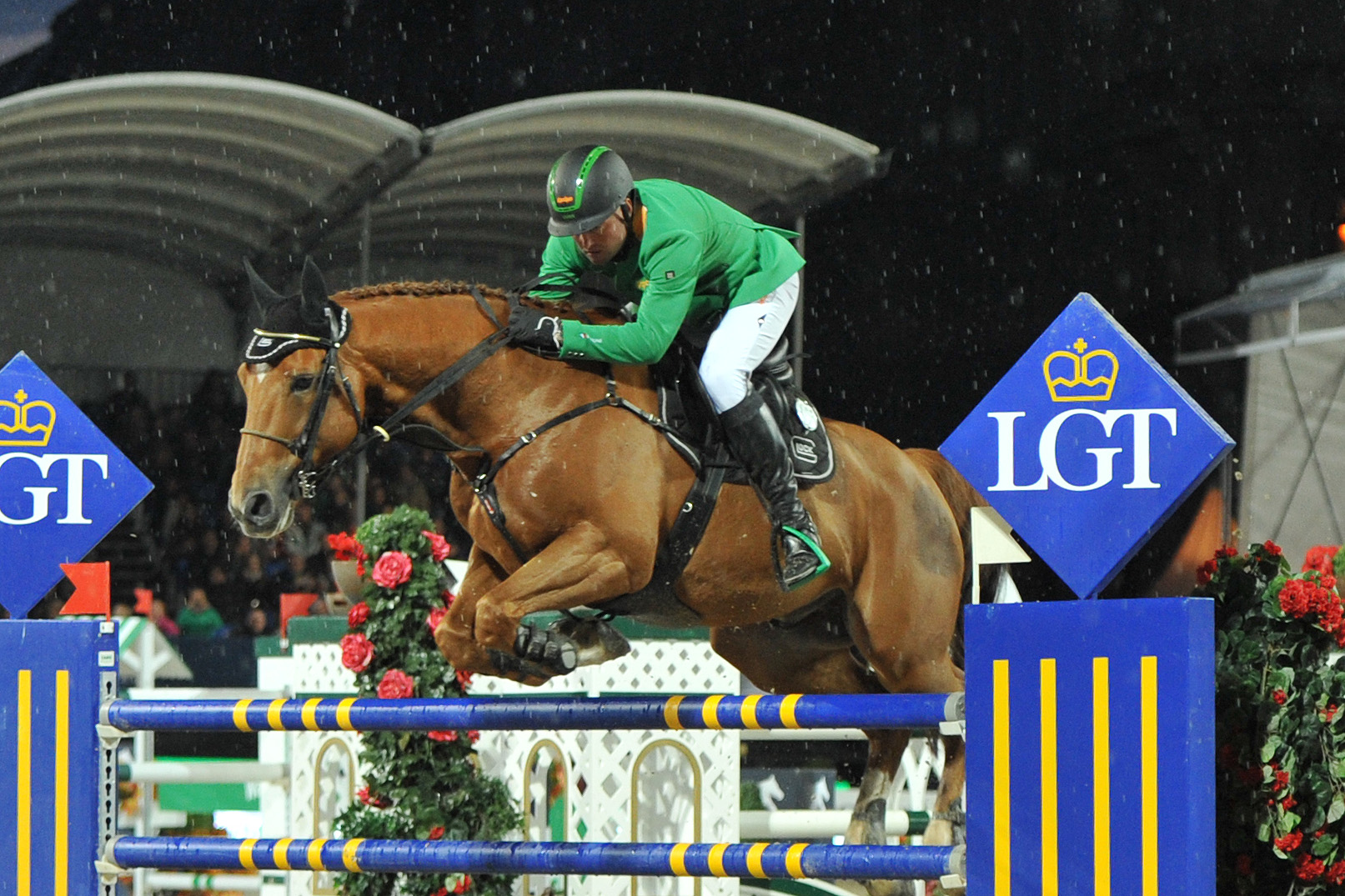 Vienna Masters am 21. September 2013 Longines Global Champions Tour Dieter Köfler (AUT) auf Glock's Prince de Vaux